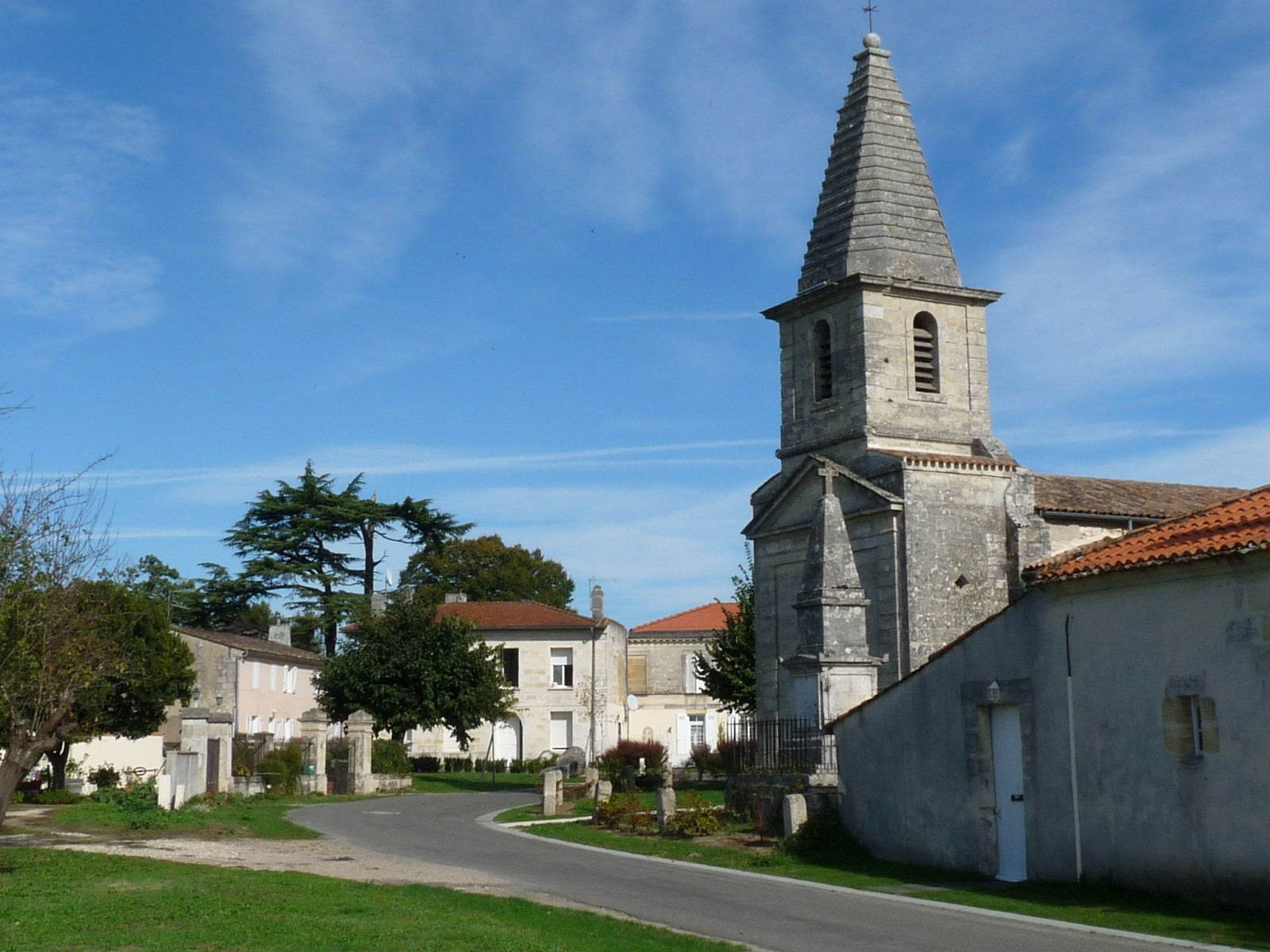 Village de Comps, Gironde, France